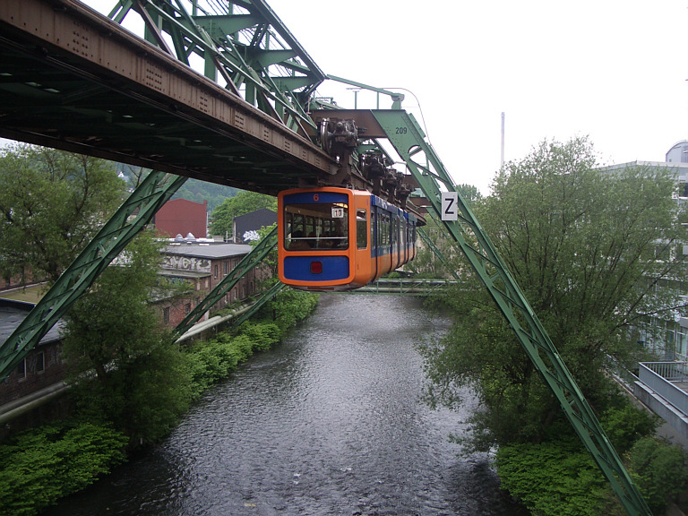 Wuppertal, Germany: Schwebebahn